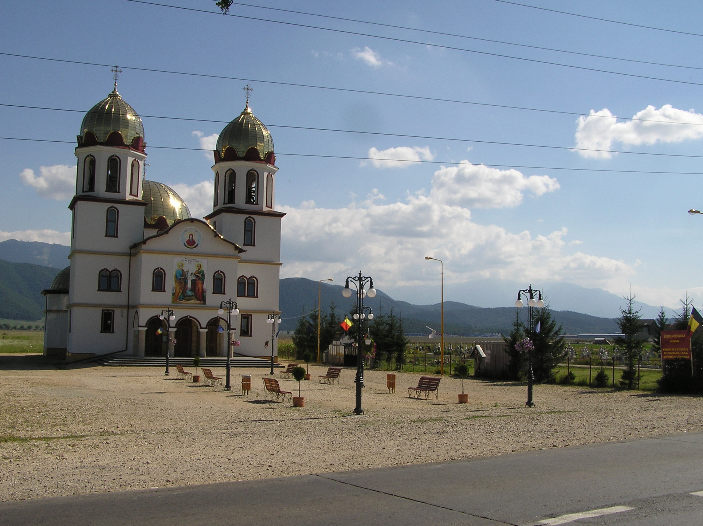 Neue orthodoxe Kirche in Ghimbav / Weidenbach, Siebenbürgen, Rumänien.